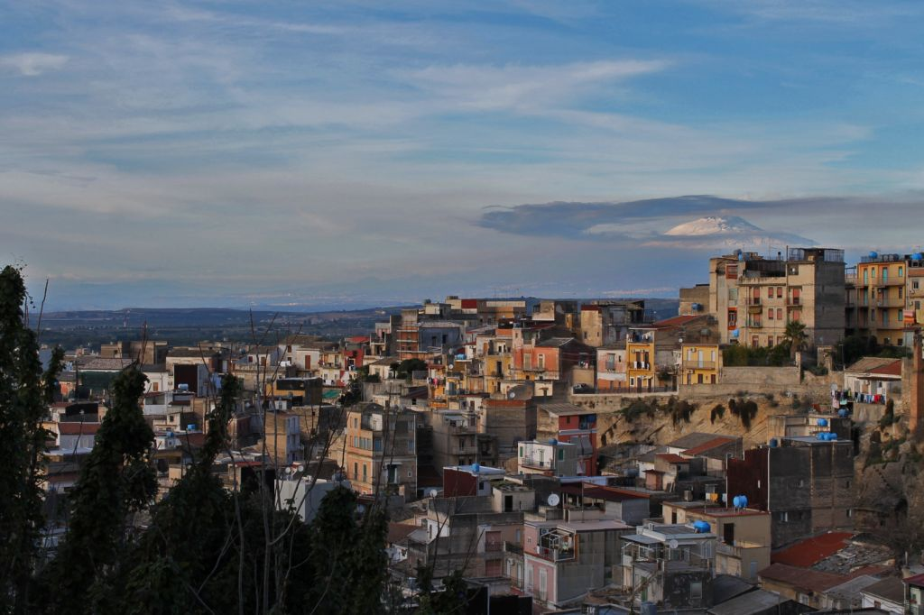 Panorama su Lentini, la piana di Catania e l'Etna dalla strada che porta all'ingresso dell'area archeologica del Castellaccio.